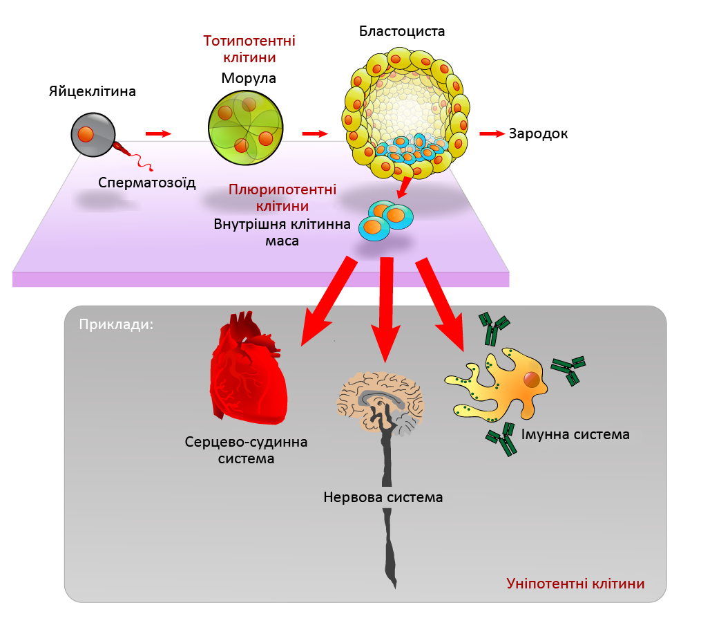 Плюрипотентні ембріональні стовбурові клітини походять із внутрішньої клітинної маси бластоцисти, вони можуть давати початок будь-якому типу клітин організму, окрім плаценти. Тотипотентними є тільки зигота та клітини морули.